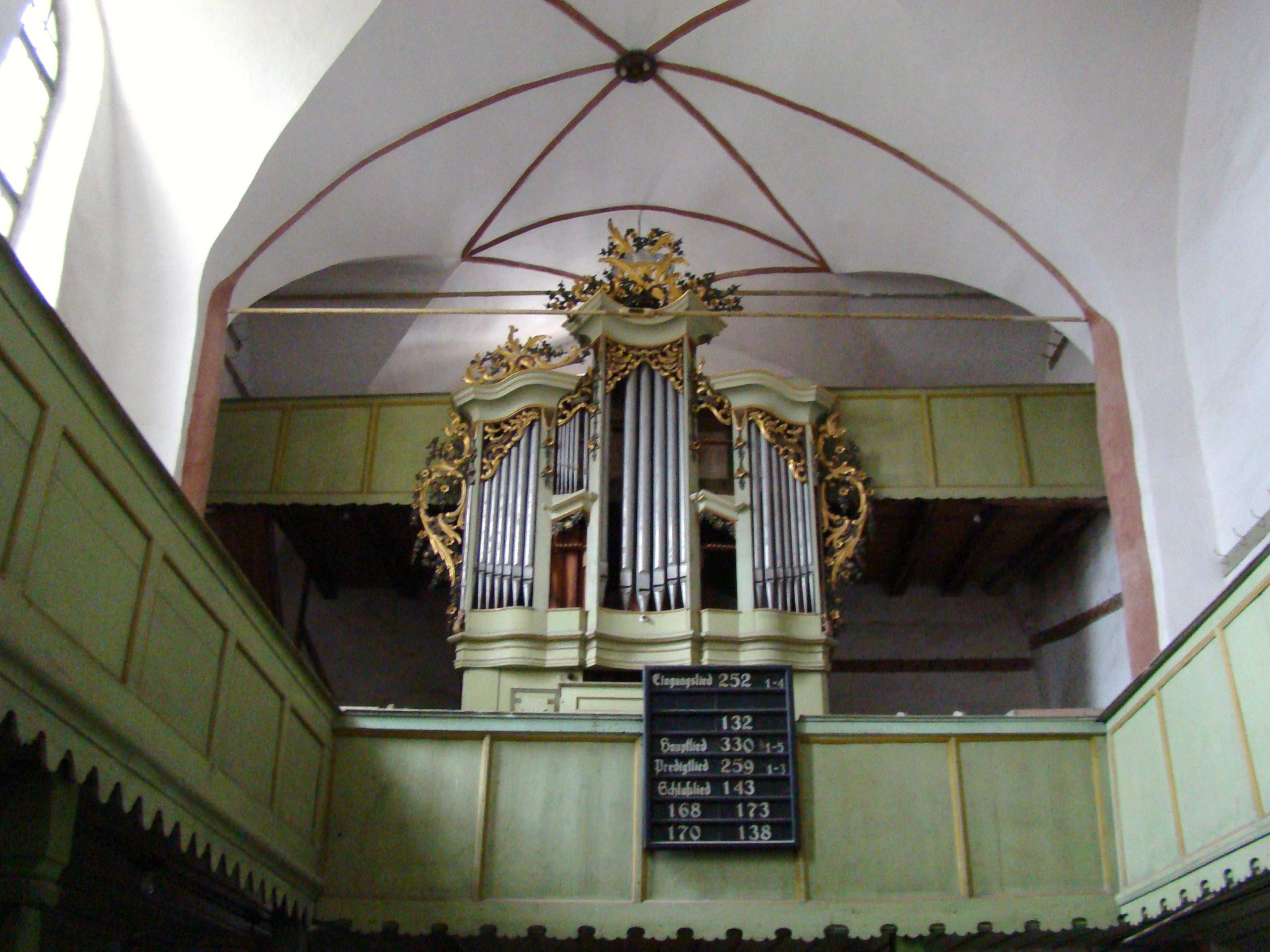 Biserica evanghelică fortificată, sat TÂRNAVA; comuna TÂRNAVA, județul Sibiu 01